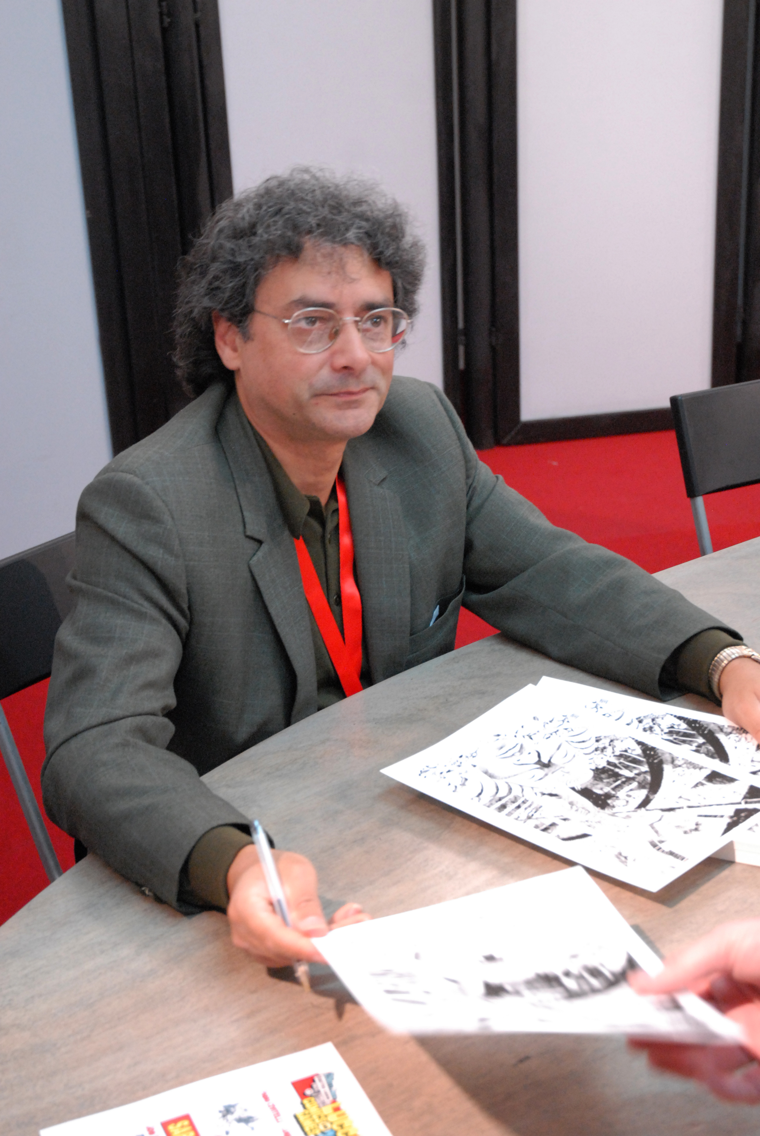 Lucio Filippucci Photo taken during Lucca Comics&Games 2010